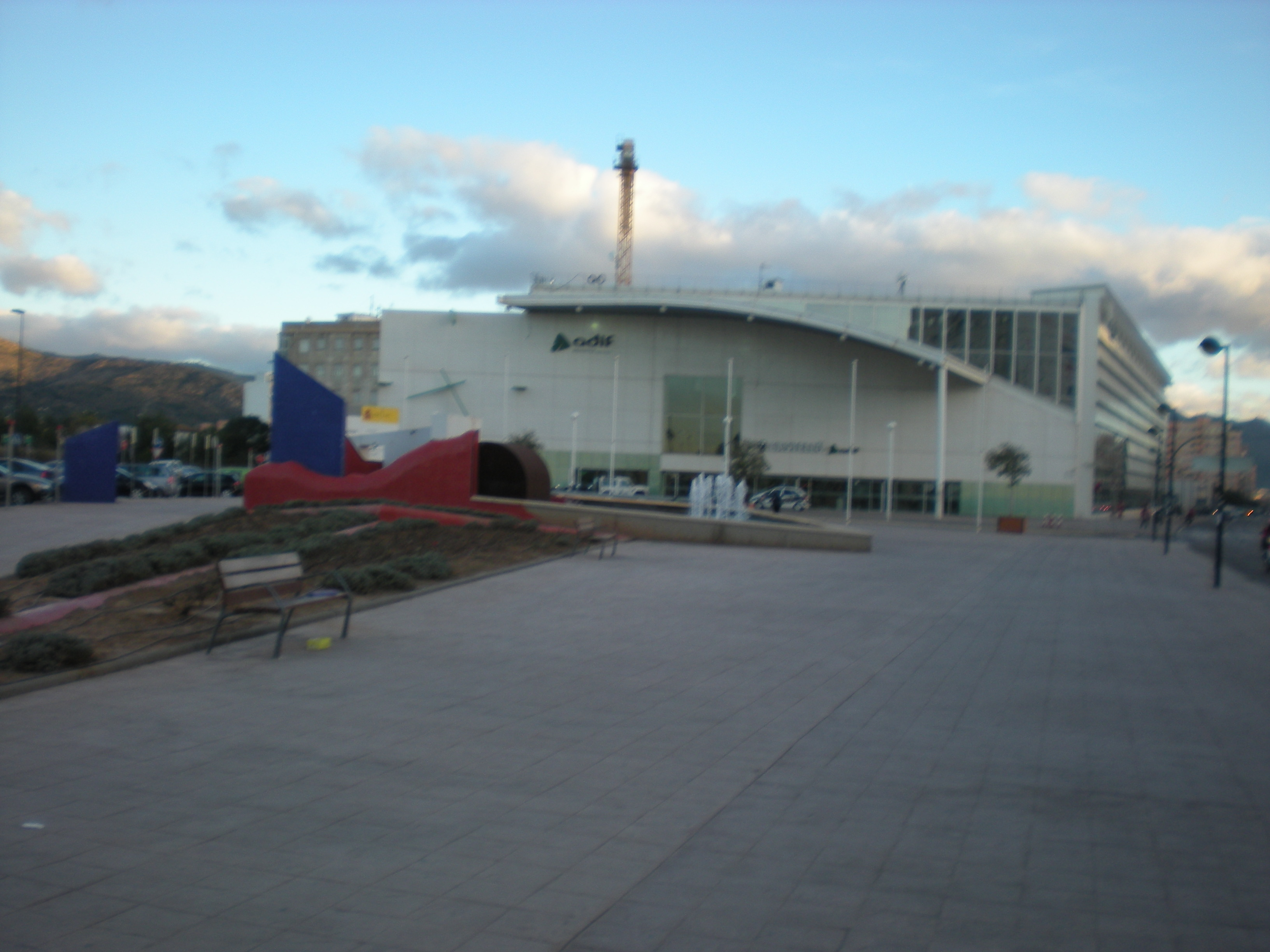 Fachada principal de la Estación de Ferrocarril de ADIF de Castellón de la Plana (España).